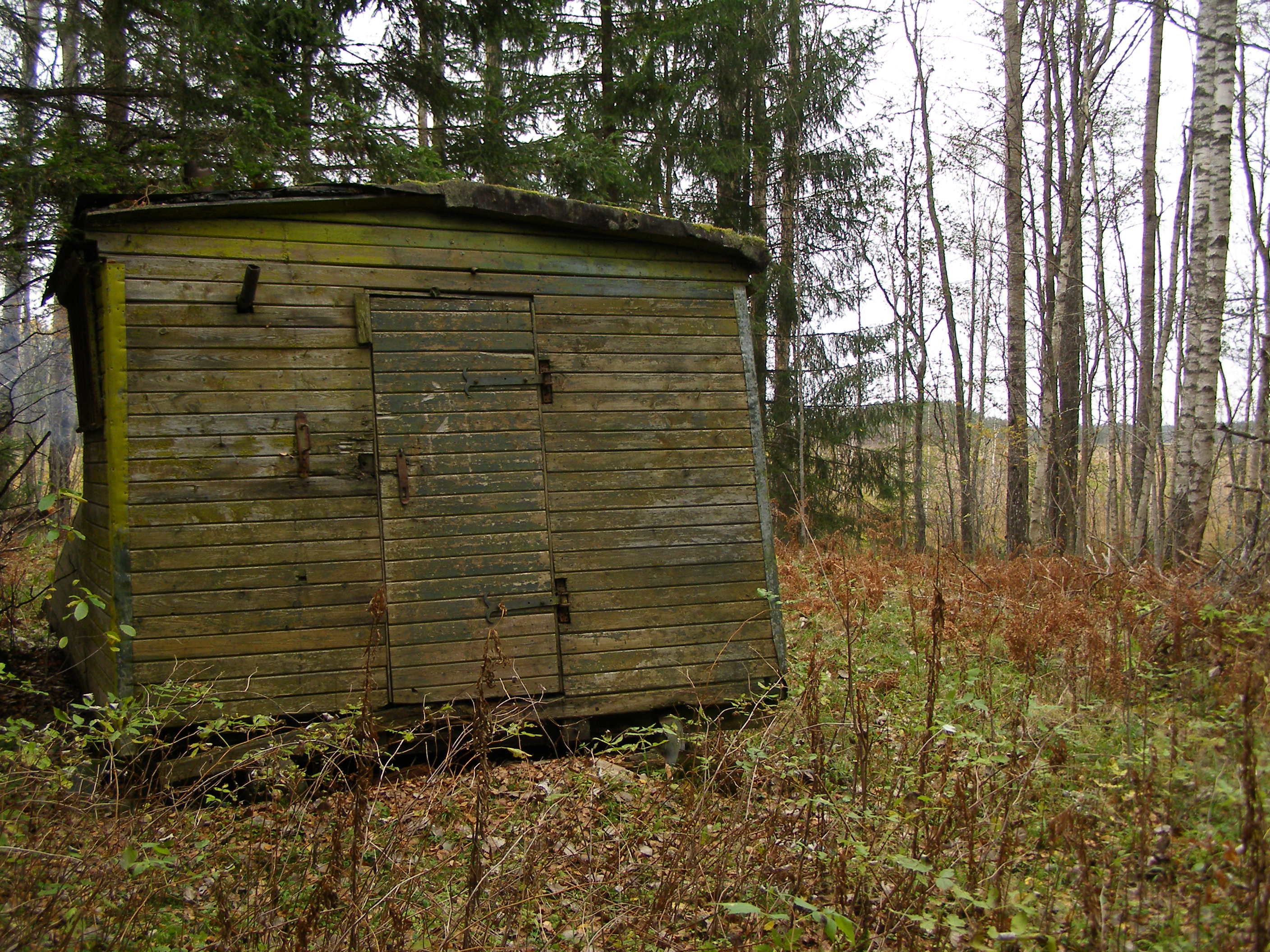 Mäurassaare soojak Muraka raba lõunaservas